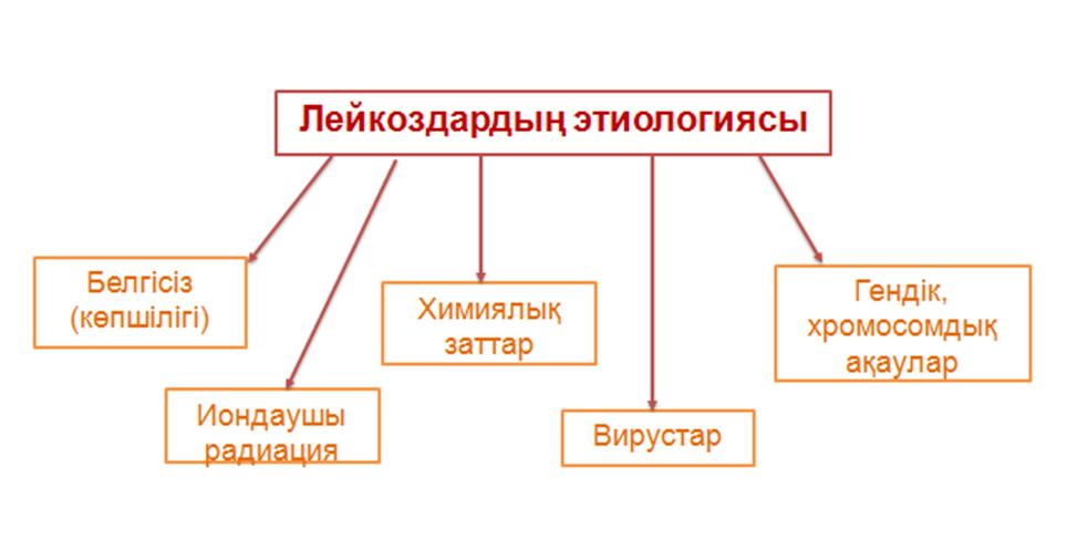 Лейкоздардың этиологиясы